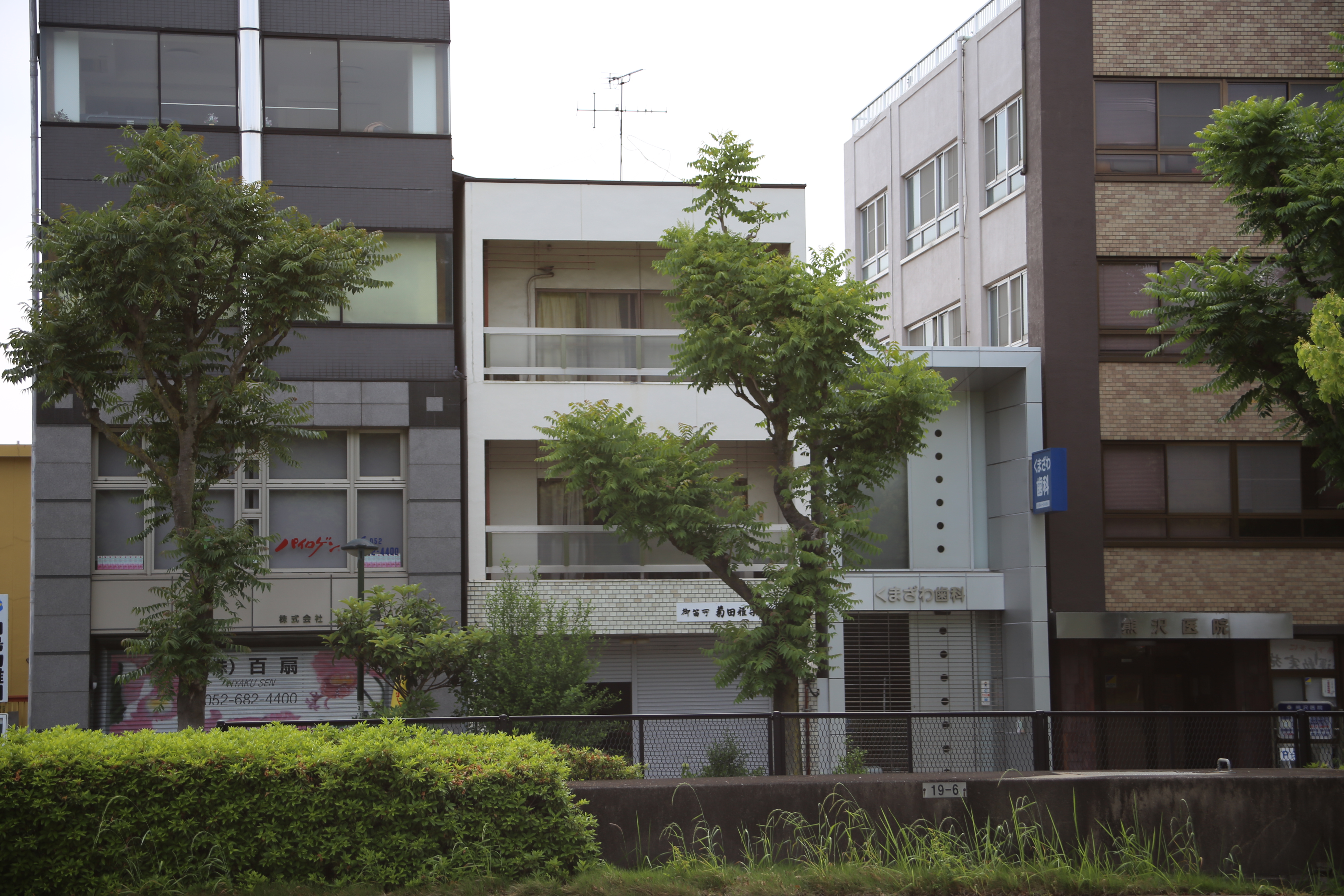 名古屋市熱田区白鳥二丁目の菊田雅楽器店を東側公道南側より撮影